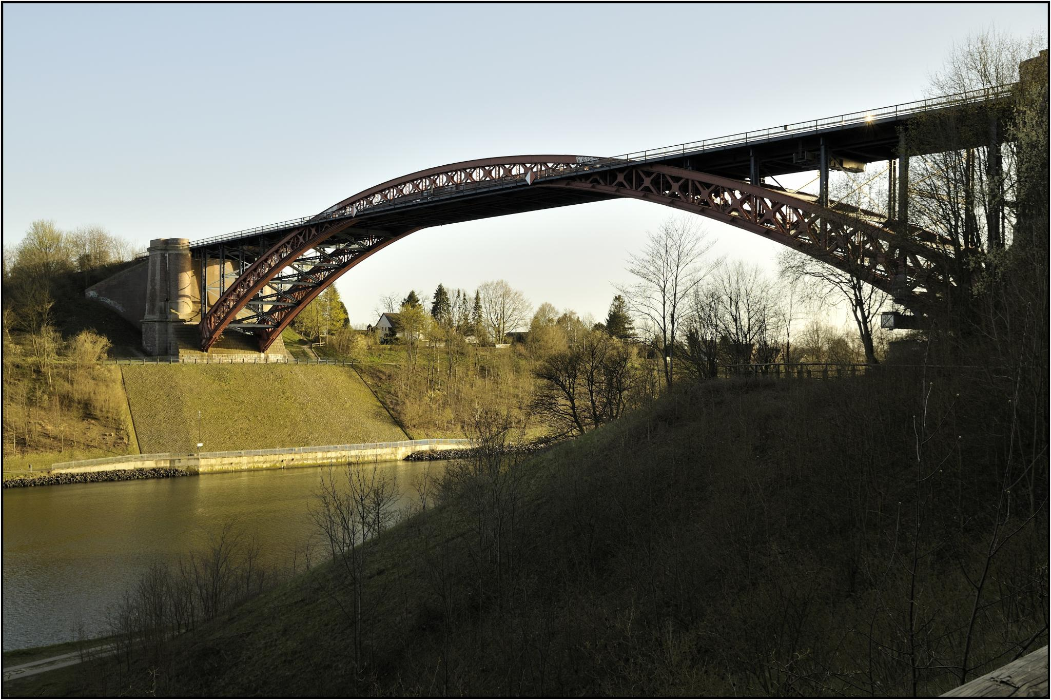 Levensauer Hochbrücke